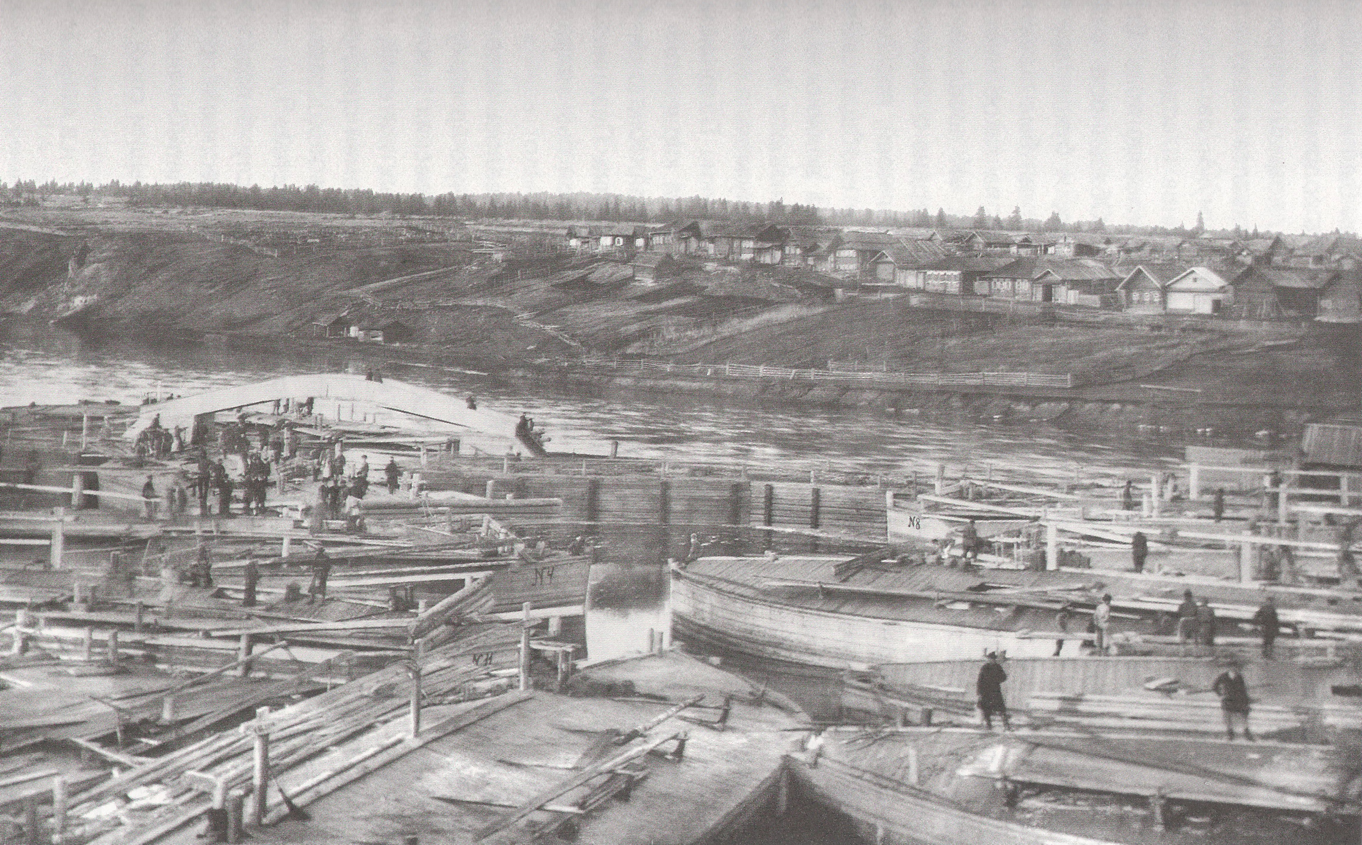 Филатов Н.Т. Староуткинская пристань, 1901